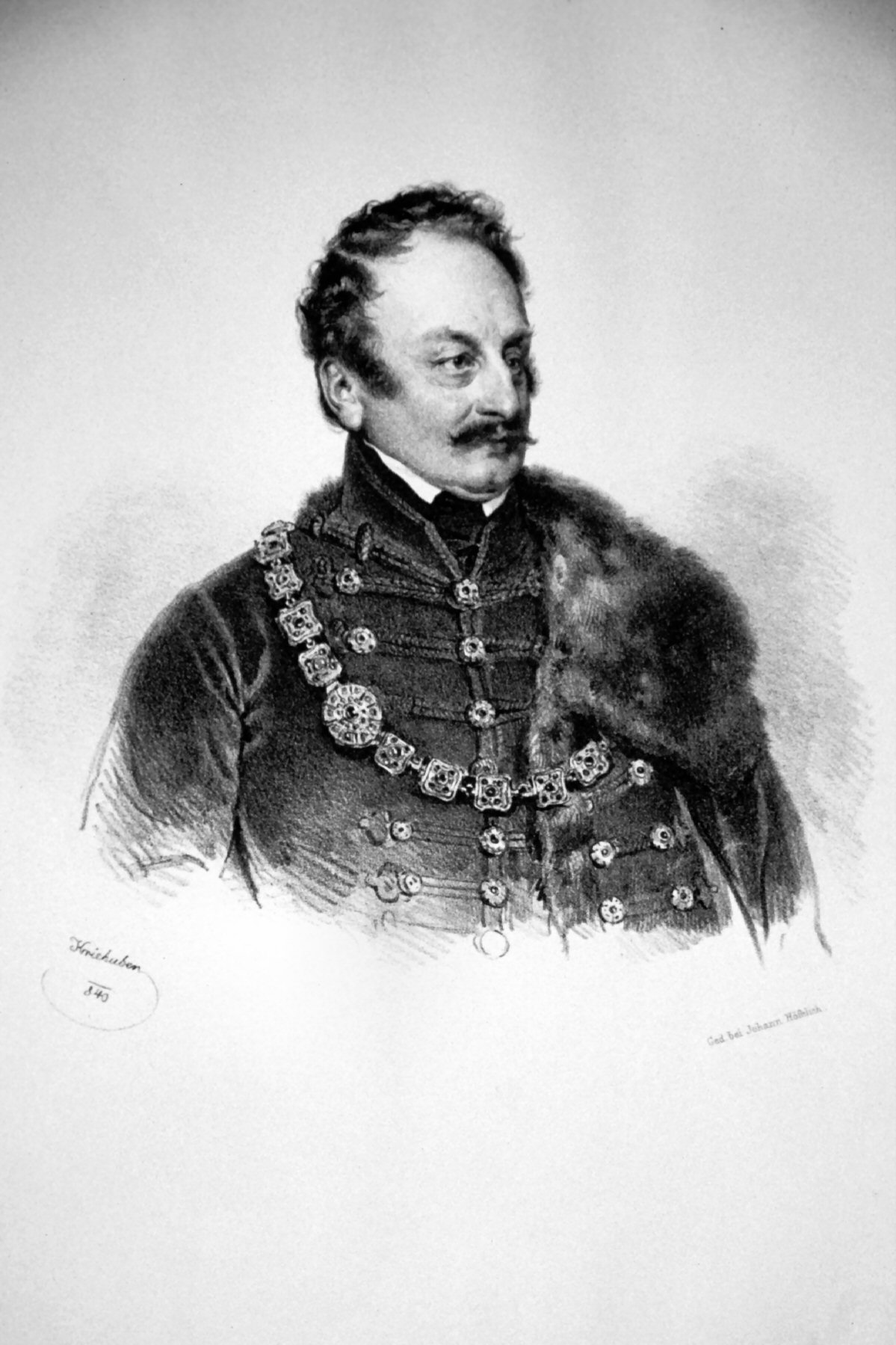 Thadäus Amadé von Varkonyi (1784-1845), Komponist und Hofmusikgraf. Lithographie von Josef Kriehuber, 1840